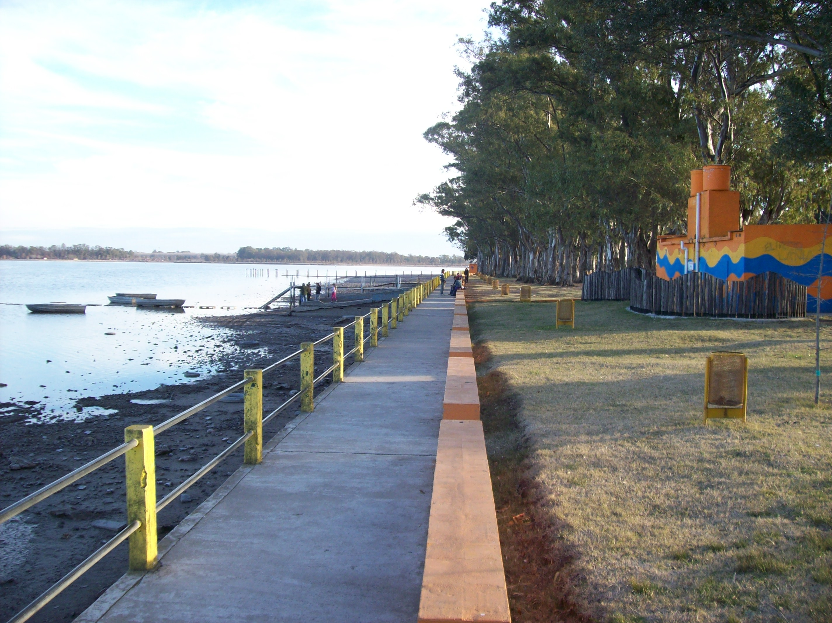 Paseo costero en la Laguna de Lobos, partido de Lobos, provincia de Buenos Aires, Argentina.